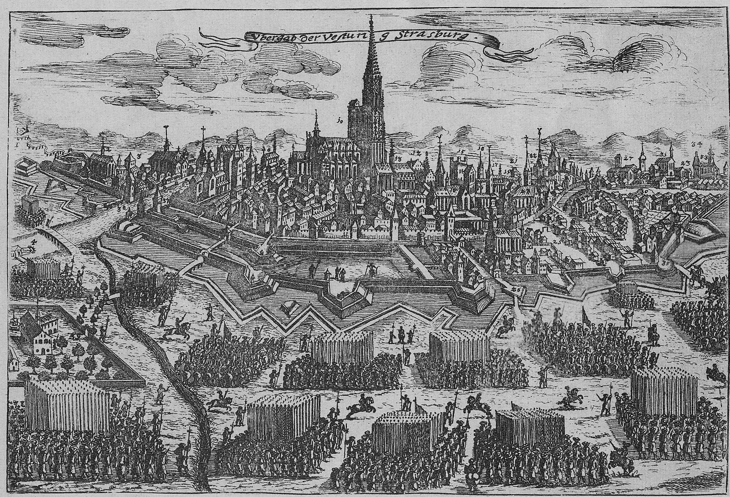 Capitulation de Strasbourg